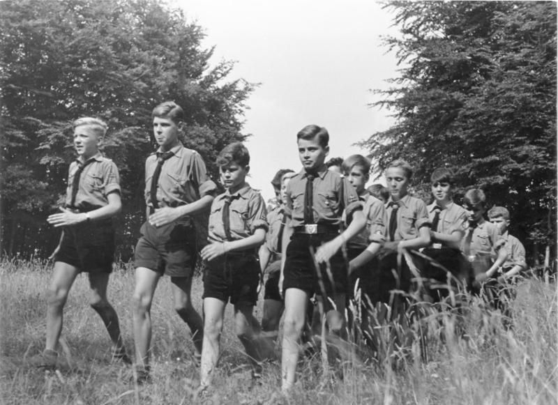 Schule im Odenwald Hitlerjungens aus der Odenwaldschule auf fröhlicher Fahrt.